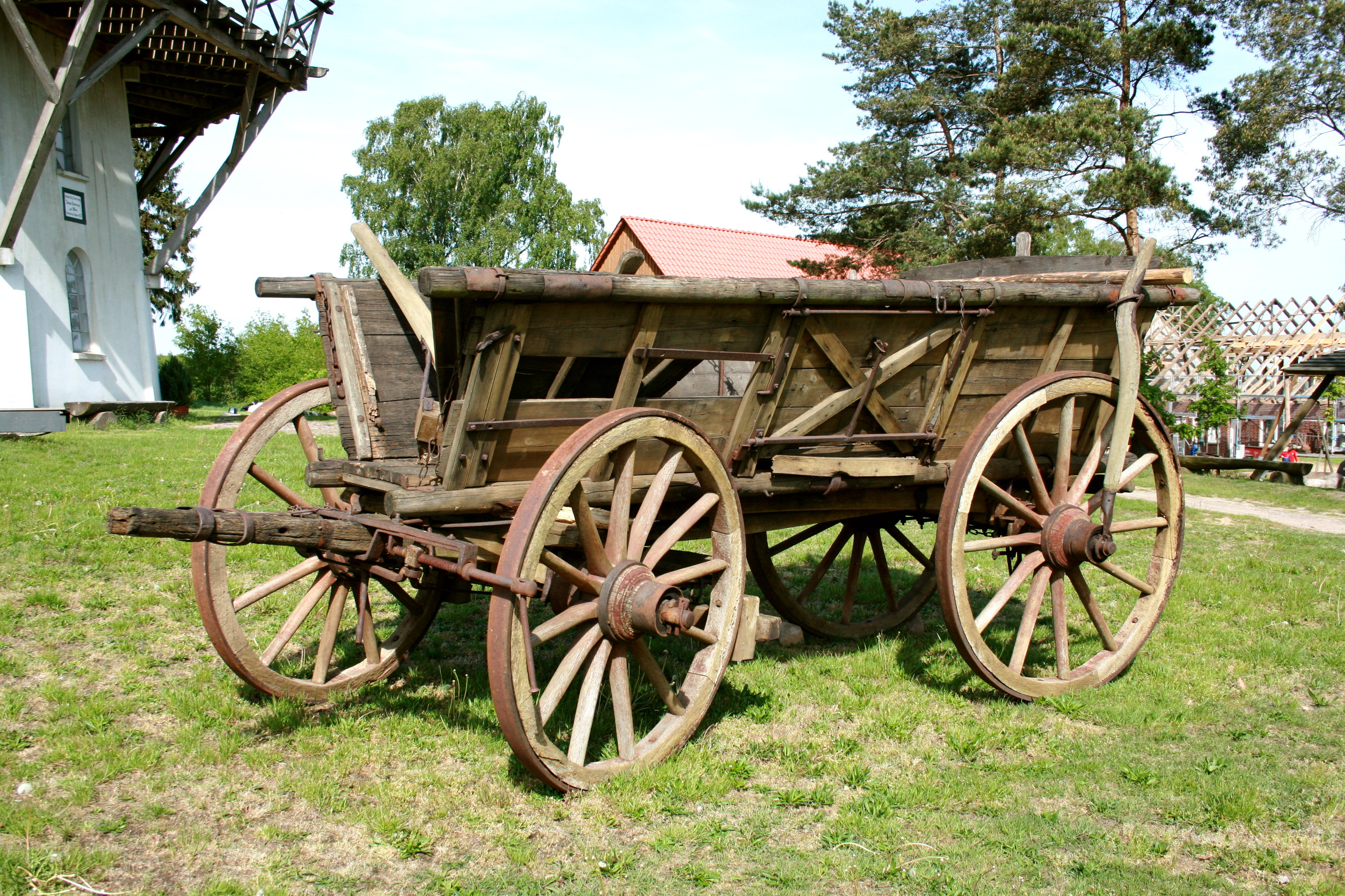 Sprengeler Mühle in Sprengel, Neuenkirchen (Lüneburger Heide)